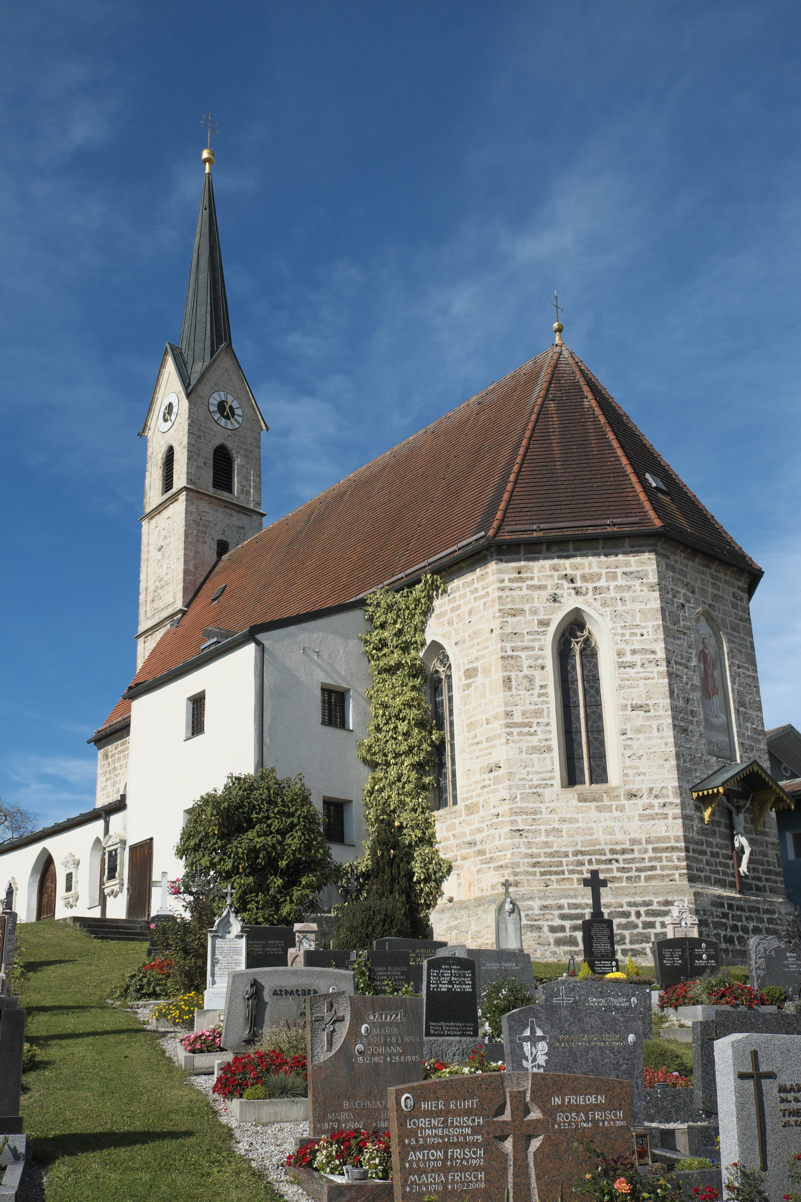 Katholische Pfarrkirche St. Laurentius in Tengling (Taching am See) im Landkreis Traunstein (Bayern/Deutschland)